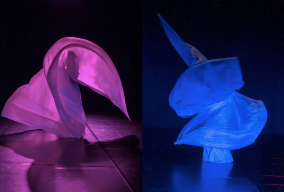 Serpentinentanz, 2014